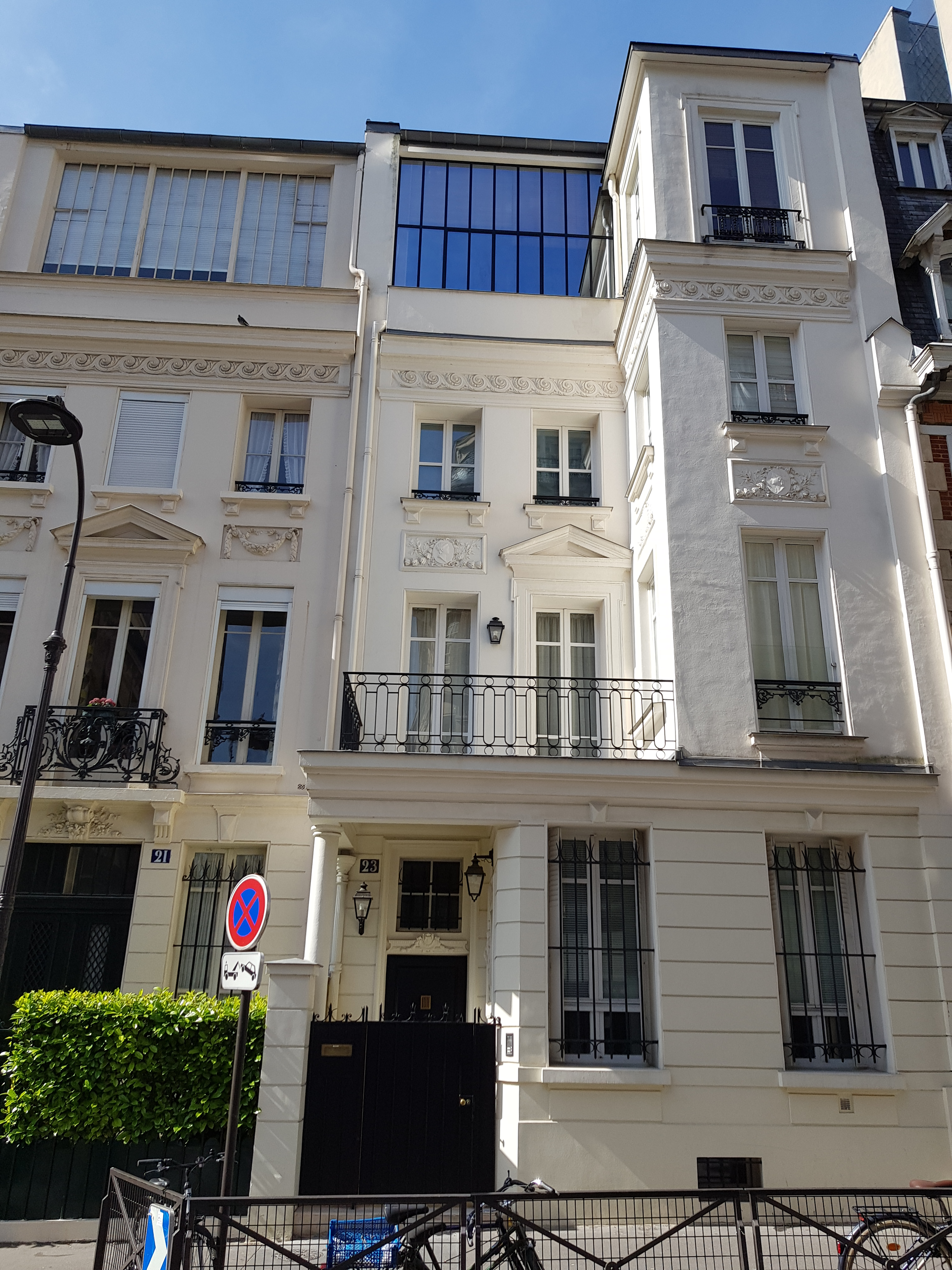 21-23, rue Dufrenoy, Paris 16e.